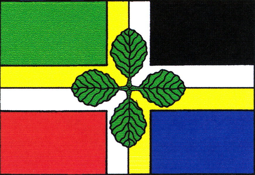 Vlajka obce Olší